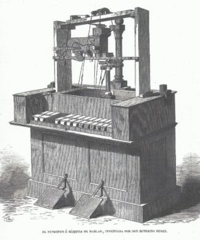 Gravado do Tecnefón, incluído na obra "El Tecnefón: memoria presentada al Excmo. Ministro de Fomento en virtud de la Real Orden", memoria editada en Madrid en 1865 por Severino Pérez Vázquez.